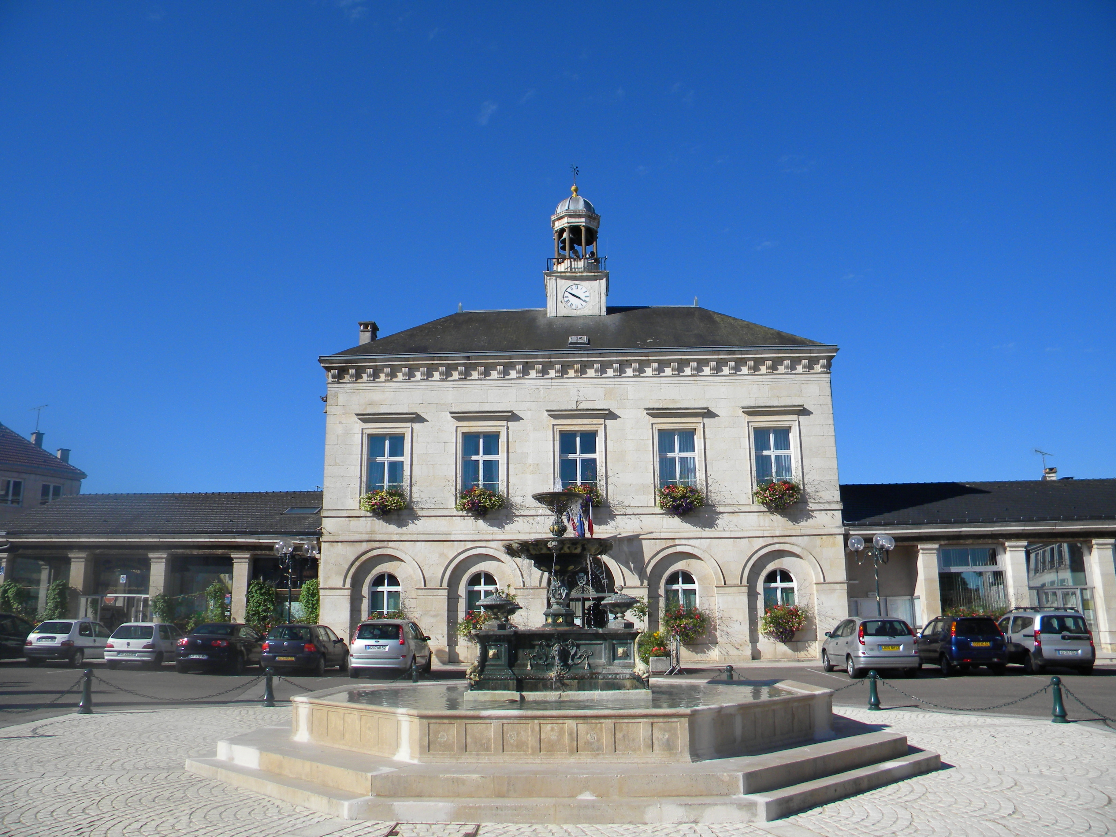 Urbodomo